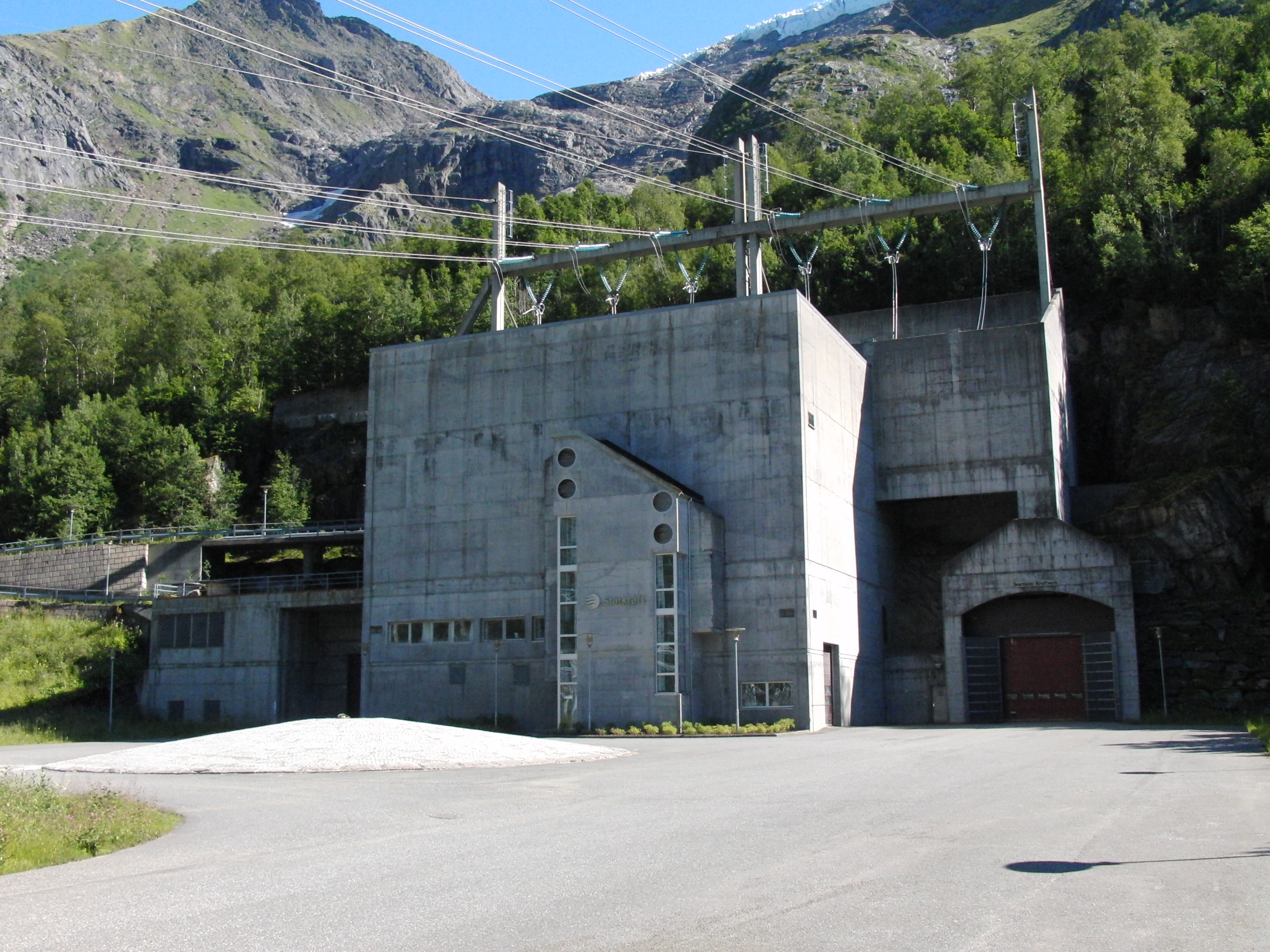 Svartisen kraftverk